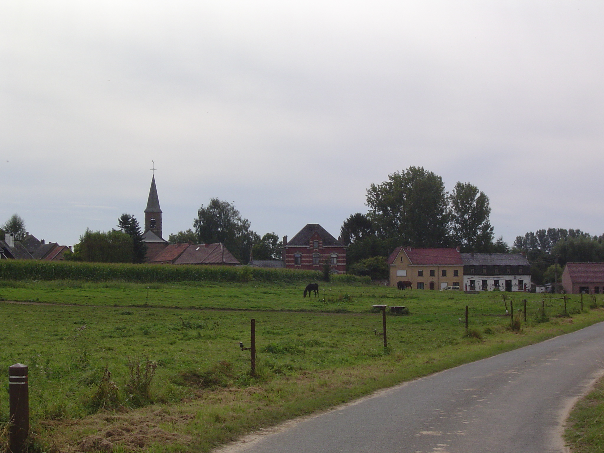 vue sur Ladeuze à partir de la Petite Drève.